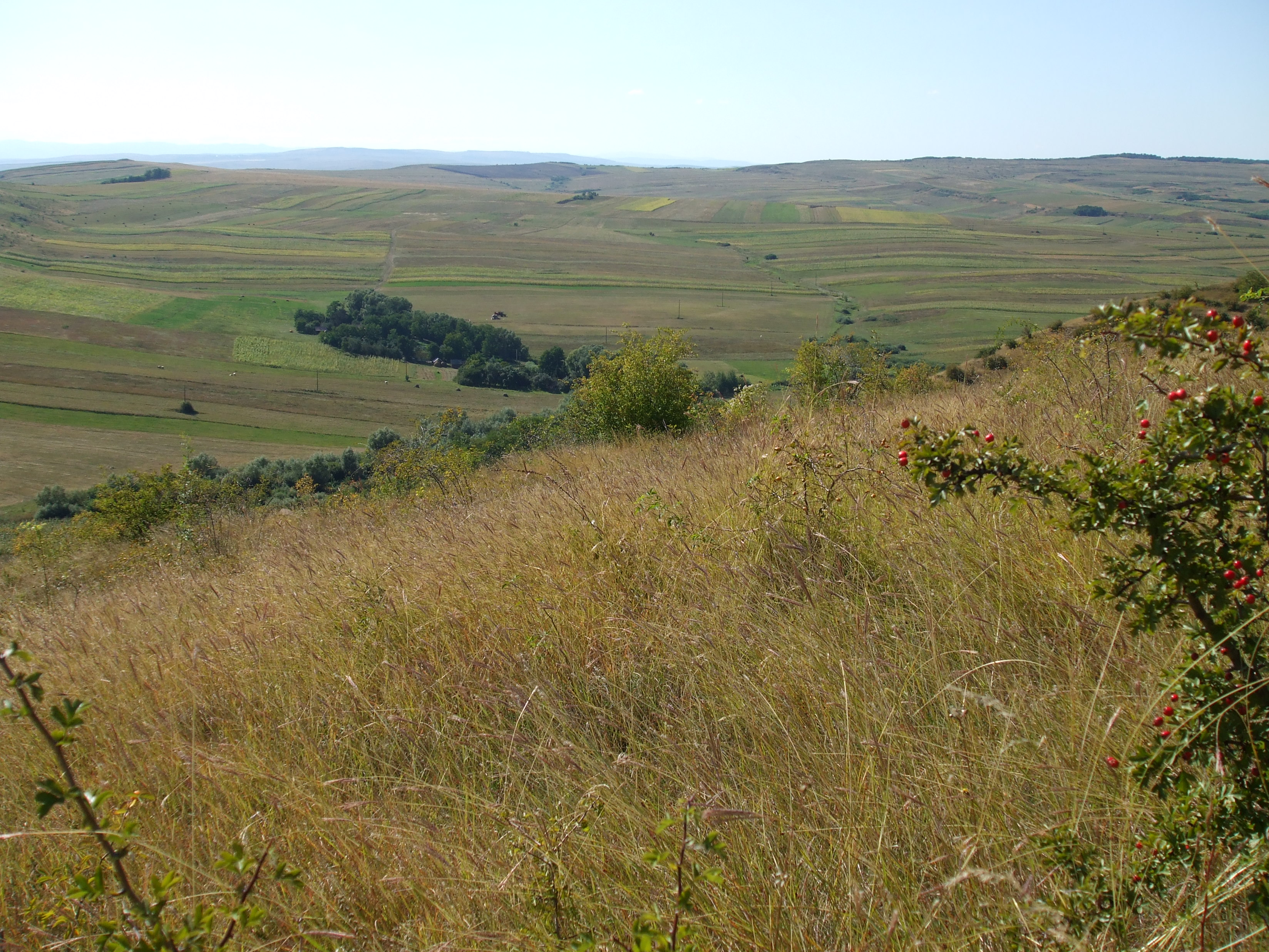 Imagini din Aruncuta